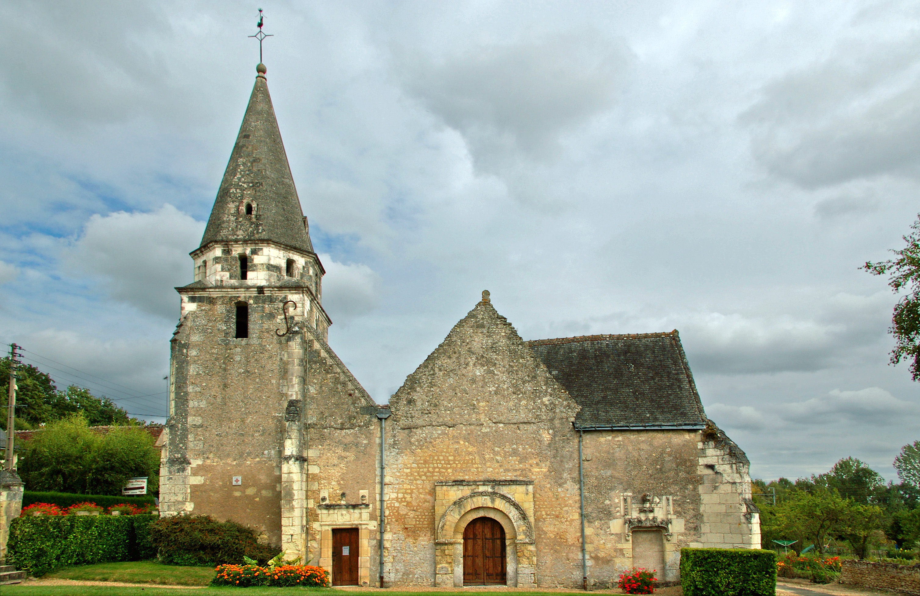 Eglise Saint Médard de Dierre. Un second collatéral fut ajouté à la nef du côté septentrional au XVIème siècle. Le clocher date de la même période. Church of Saint Médard Dierre. A second collateral was added to the nave on the north side in the sixteenth century.The bell tower dates from the same period.